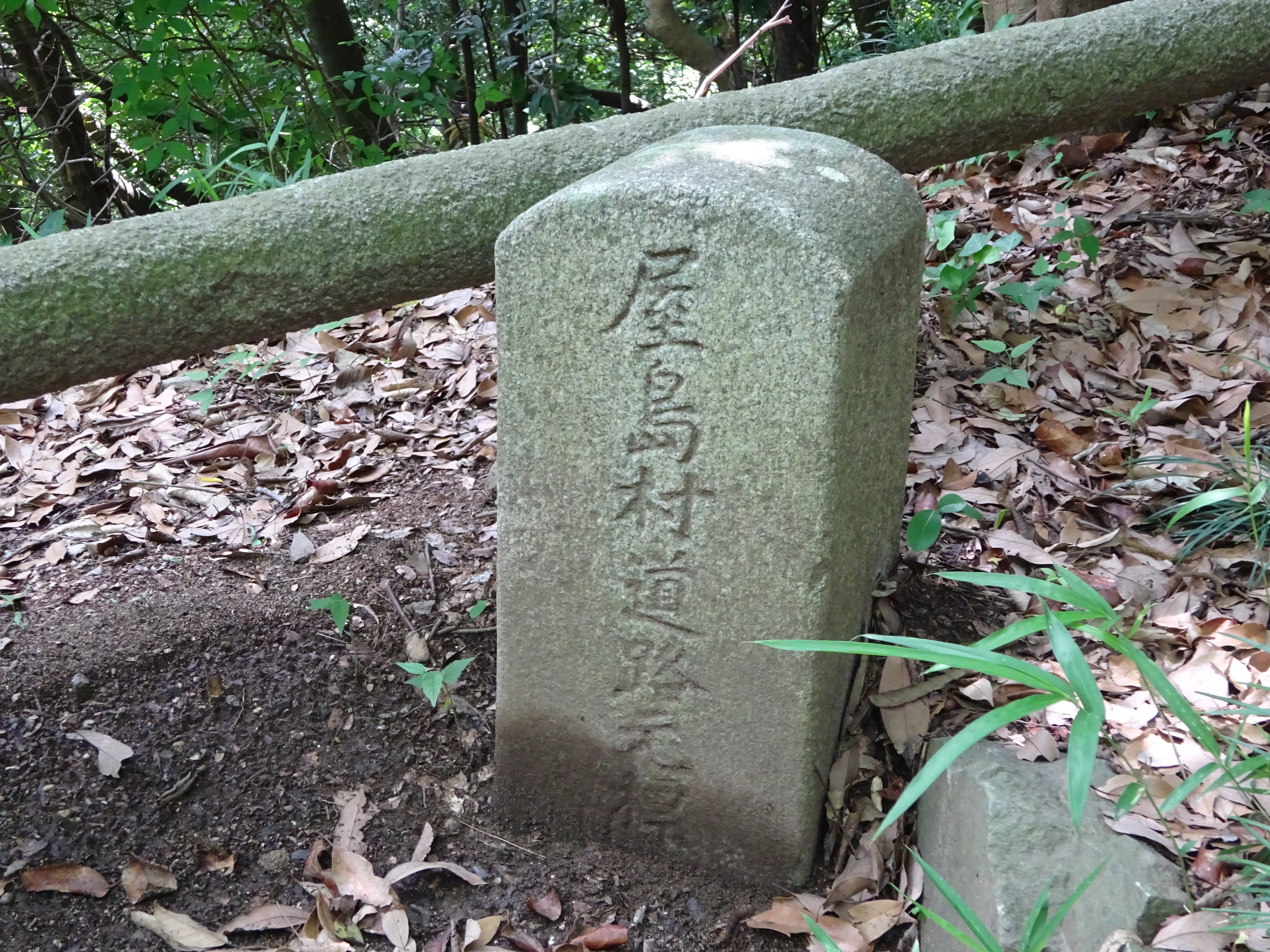 香川県道ーＲ１４号、起点にある屋島村道路元標（大正8年）